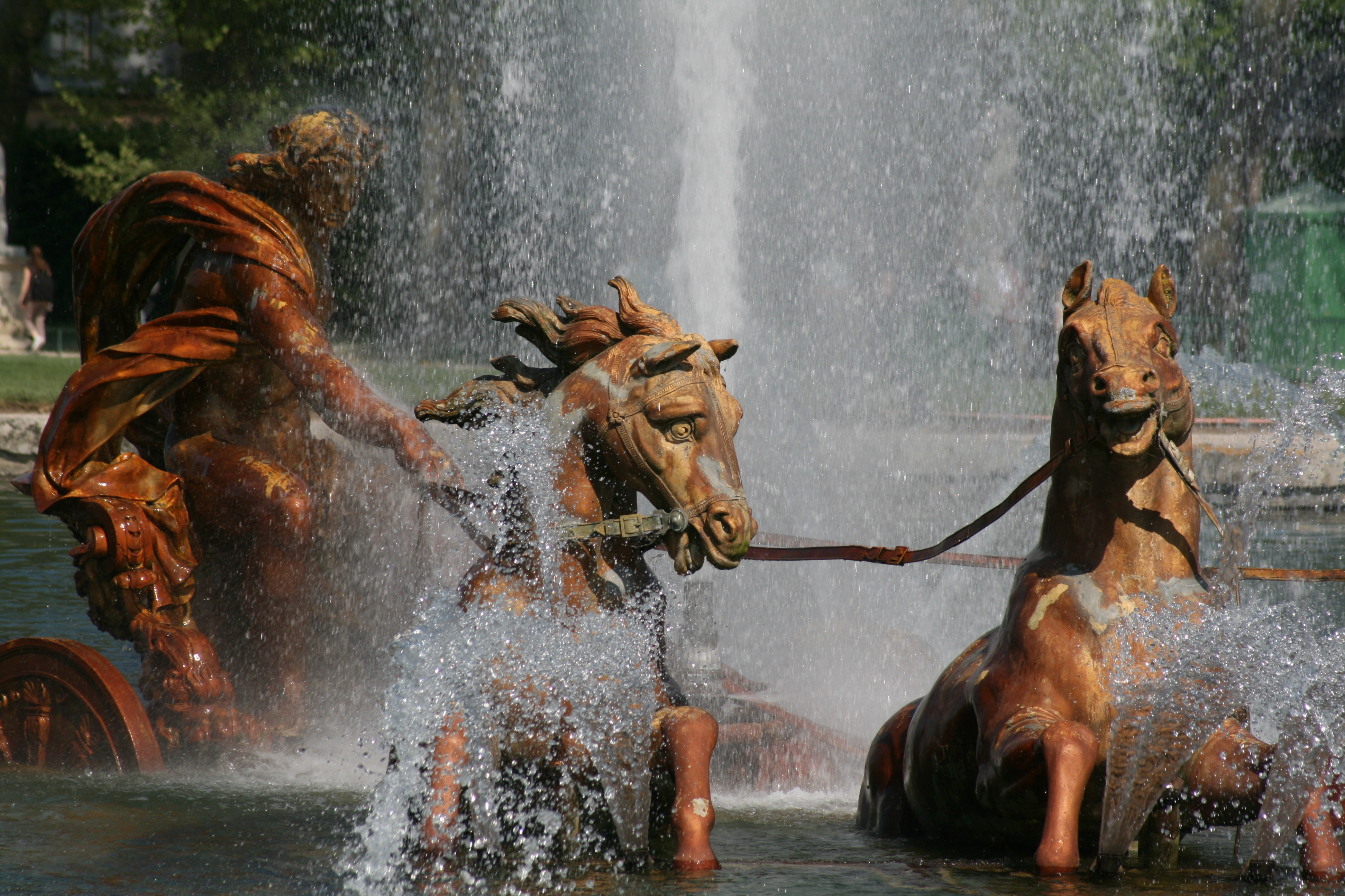 Apollon et ses chevaux, dans le Bassin du char d'Apollon, dans le parc du Château de Versailles, pendant les Grandes Eaux.